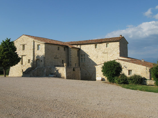 Lieu-dit La grande Bastide, fief de Brauch et membre de la commanderie de Saint-Maurice à l'époque des ordres militaires (Templiers puis Hospitaliers), commune de La Verdière, Var, France